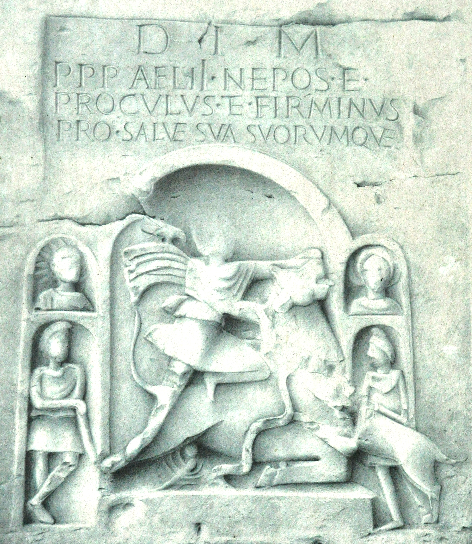 Autel votif à Mithra provenant de Rodine, l'actuelle Rožancu près de Črnomlju en Slovénie, portant l'inscription D(eo) I(nvicto) M(ithrae) / PPP(ublii) Aelii Nepos et / Proculus et Firminus / pro salute sua suorumque, CIL III, 3933 = CIL III, 10818 = AIJ 00485 = ILSlov-01, 00148 = CIMRM-02, 01483.